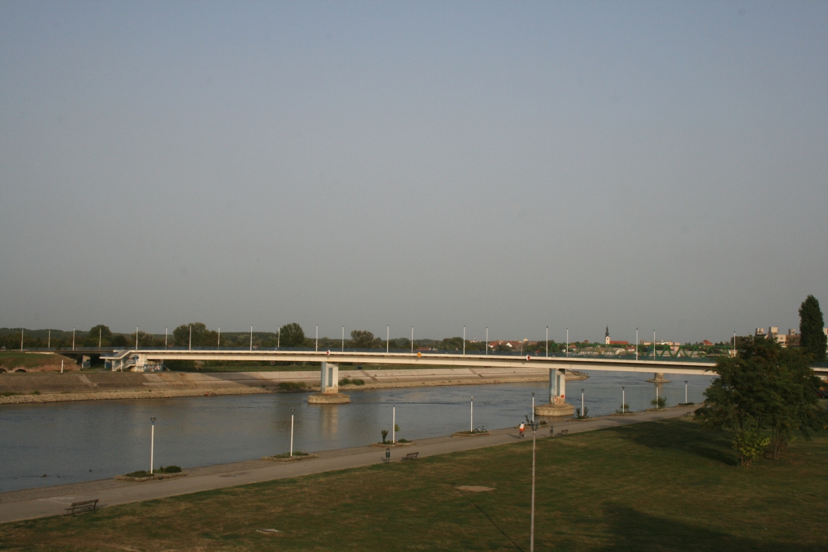 Most přes řeku Drávu v Osijeku, Chorvatsko